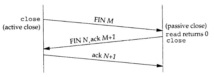 Chiudere una connessione in maniera abbreviata: 3-way handshake